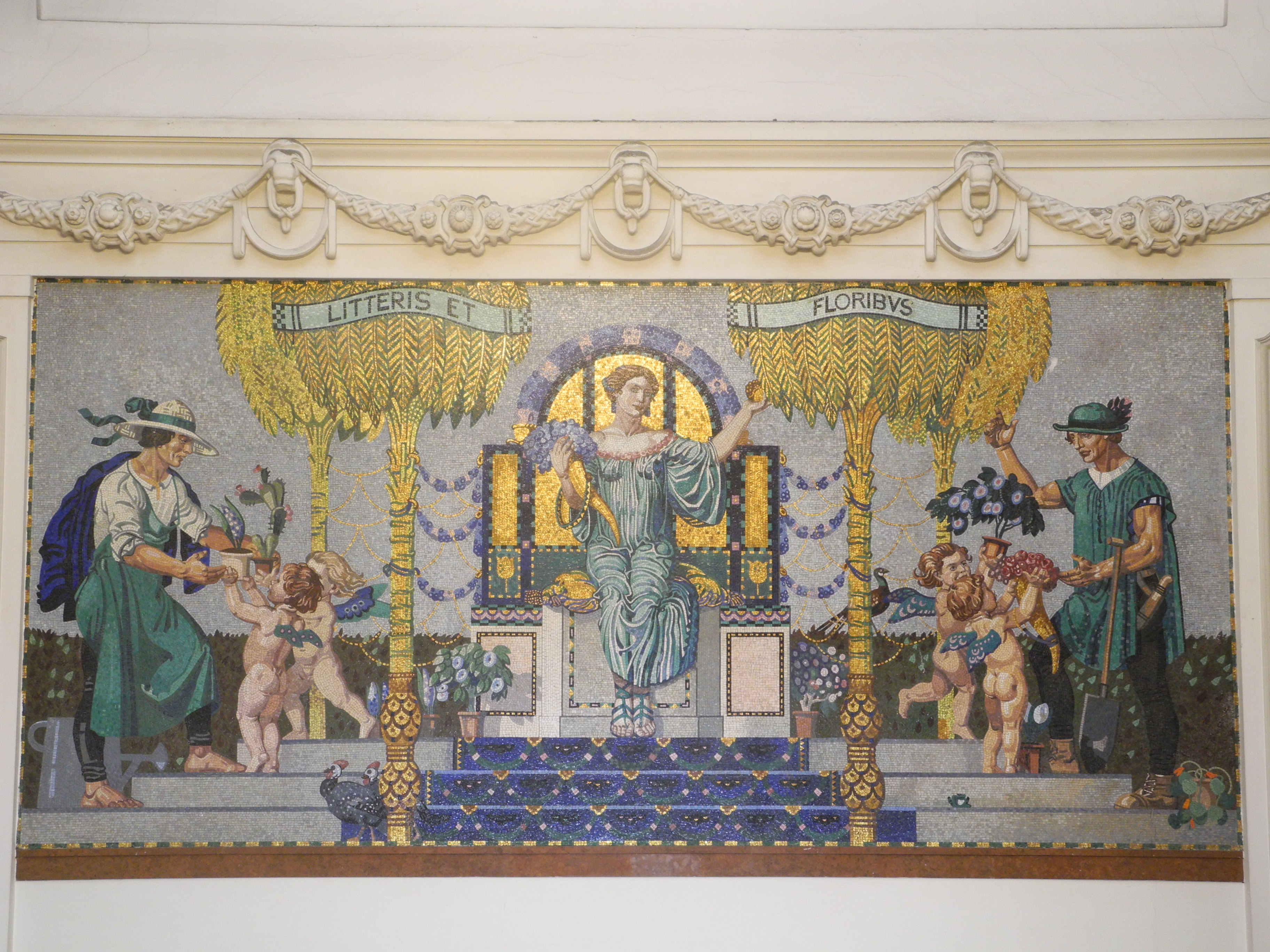 Wand-Mosaik in der Eingangshalle des historisches Gebäudes des Botanischen Instituts in München, Menzingerstr. 67; Einweihung im Jahr 1914. In diesem Gebäude befinden sich derzeit die Systematische Botanik und Mykologie, das Herbar der LMU sowie die ʽBotanische Staatssammlungʼ.